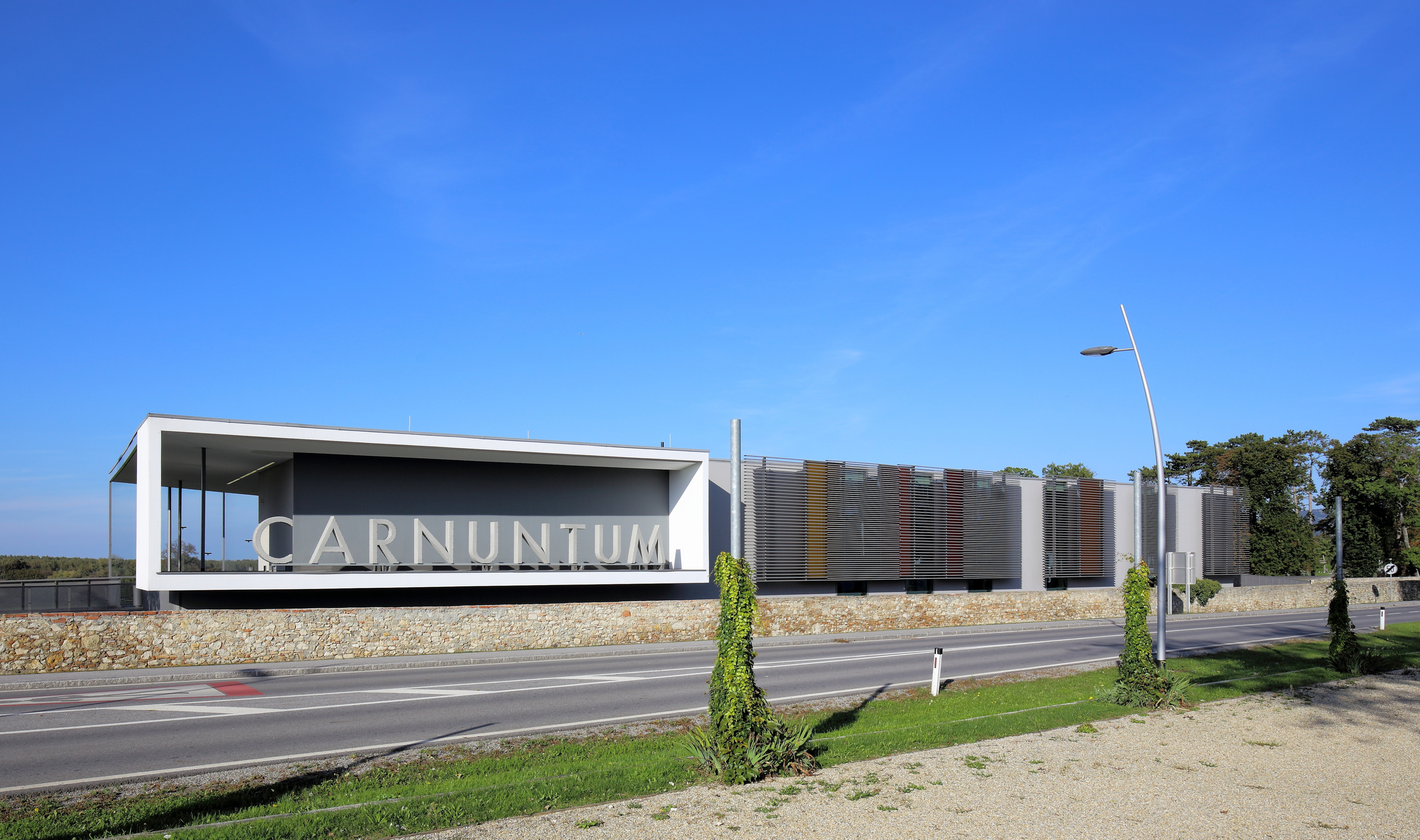 Besucherzentrum des Freilichtmuseums Petronell in der niederösterreichischen Marktgemeinde Petronell-Carnuntum. Das Besucherzentrum wurde anlässlich der Niederösterreichischen Landesausstellung 2011 um rund 4 Mio. Euro nach den Plänen des Architekturbüros Gallister gebaut. Weiters wurde unmittelbar daneben ein Parkplatz für etwa 340 PKWs und 22 Bussen errichtet.